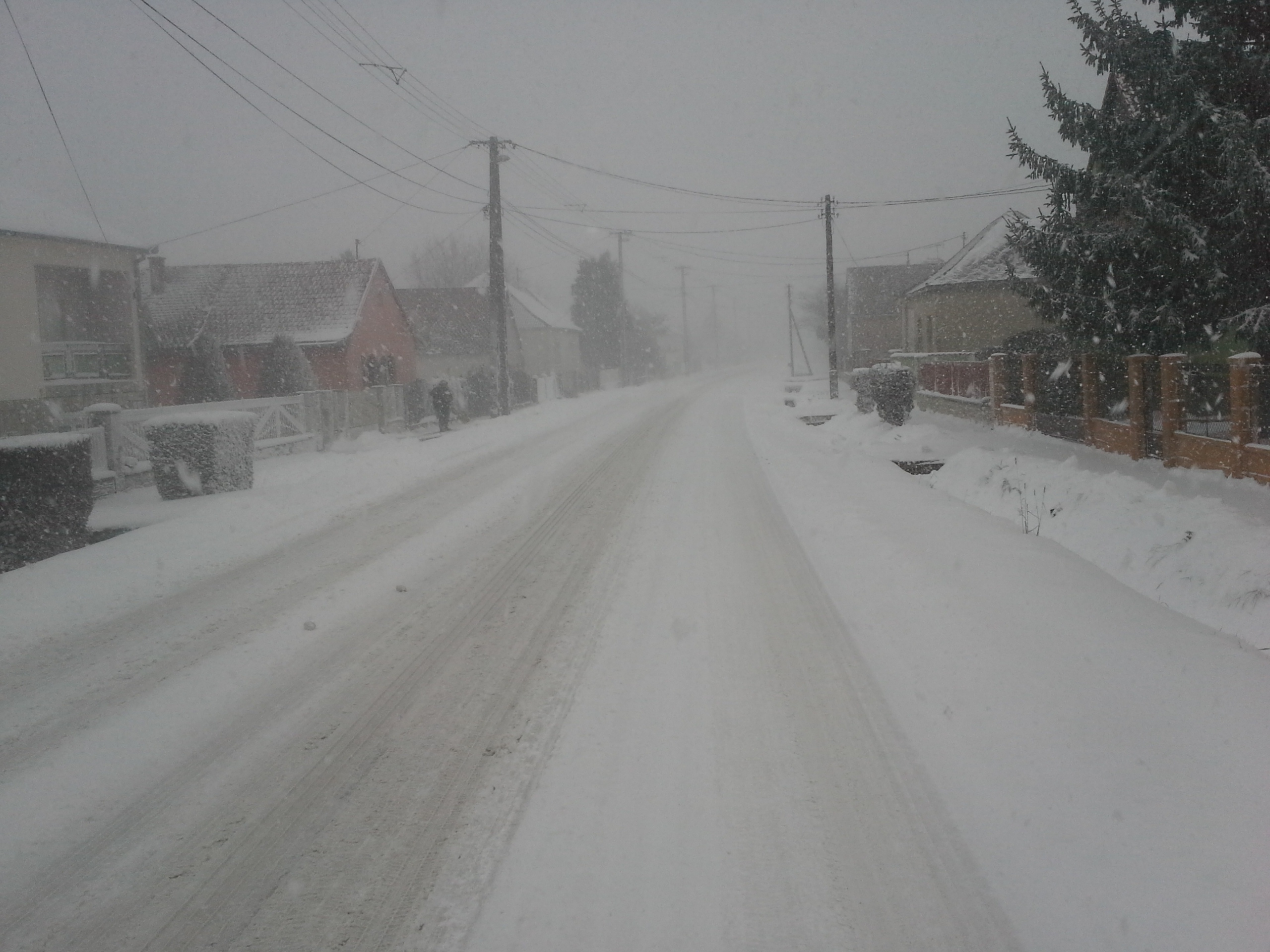 Szalánta Hunyadi utca Pécs felől